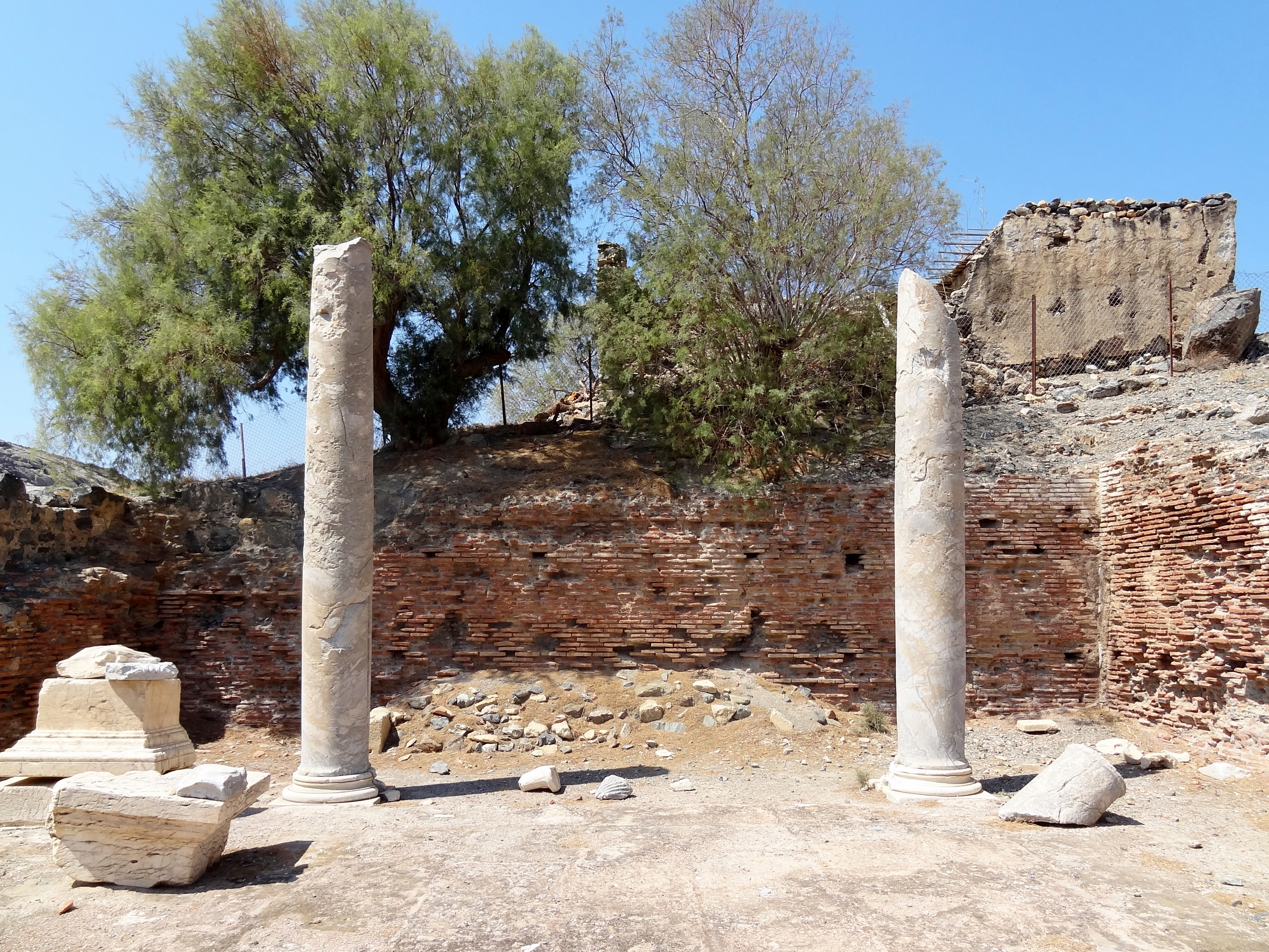 Asklepios-Heiligtum des antiken Leben (Λεβήν) in Lendas, Gemeinde Gortyna, Regionalbezirk Iraklio, Kreta, Griechenland